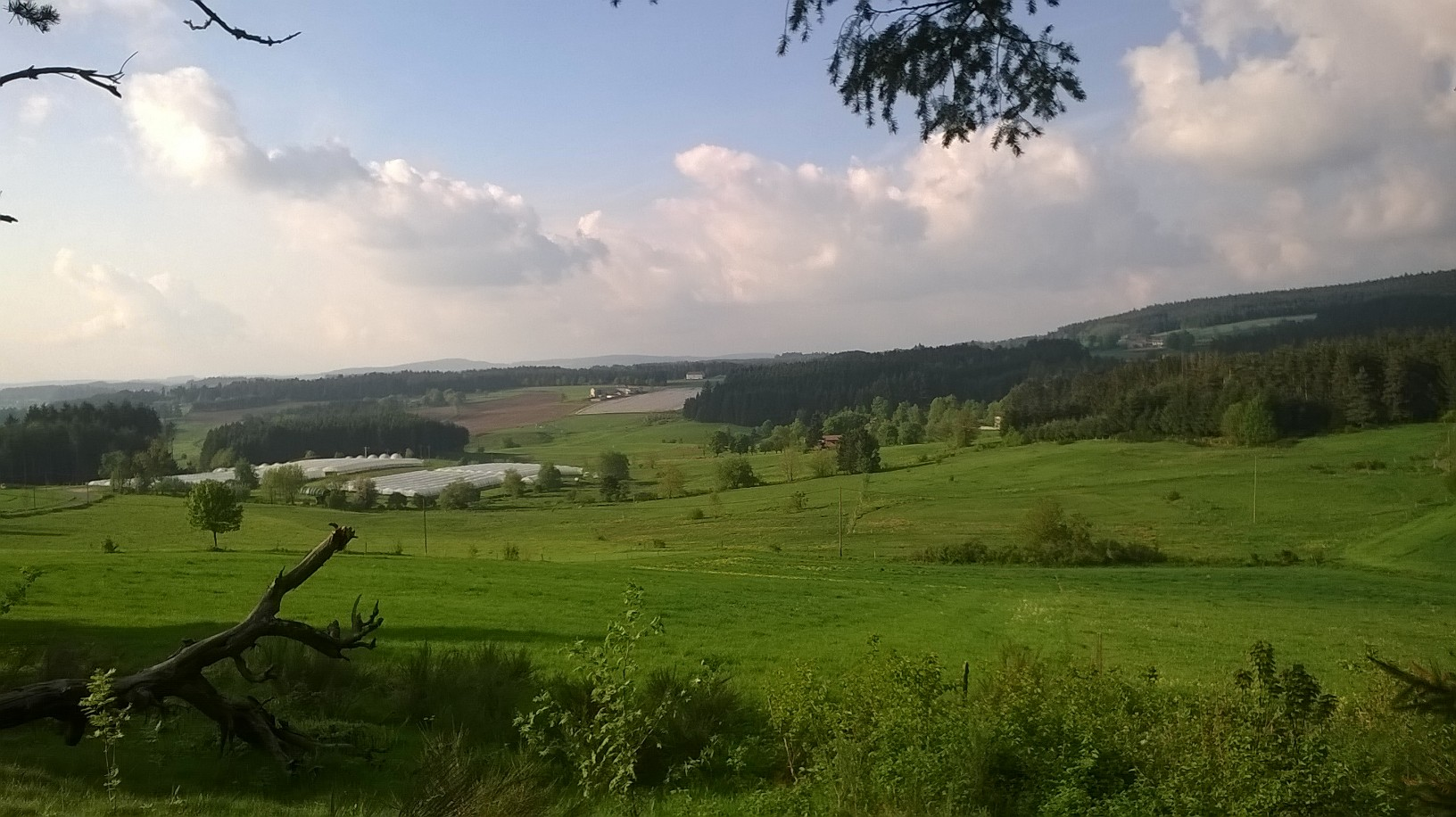 montregard8